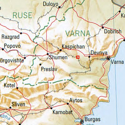 Prowadia - Lage des Ortes in Bulgarien